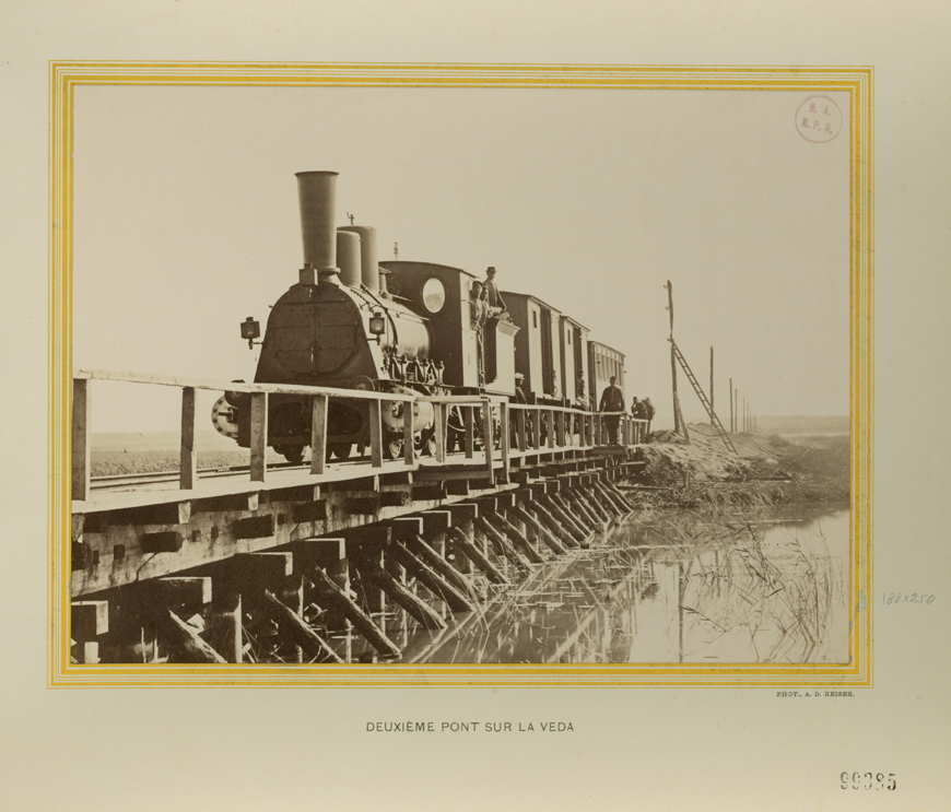 From the album "La construction des chemins de fer militaires de l'armée russe - Bucharest-Zimnicea" Deuxième pont sur la Veda